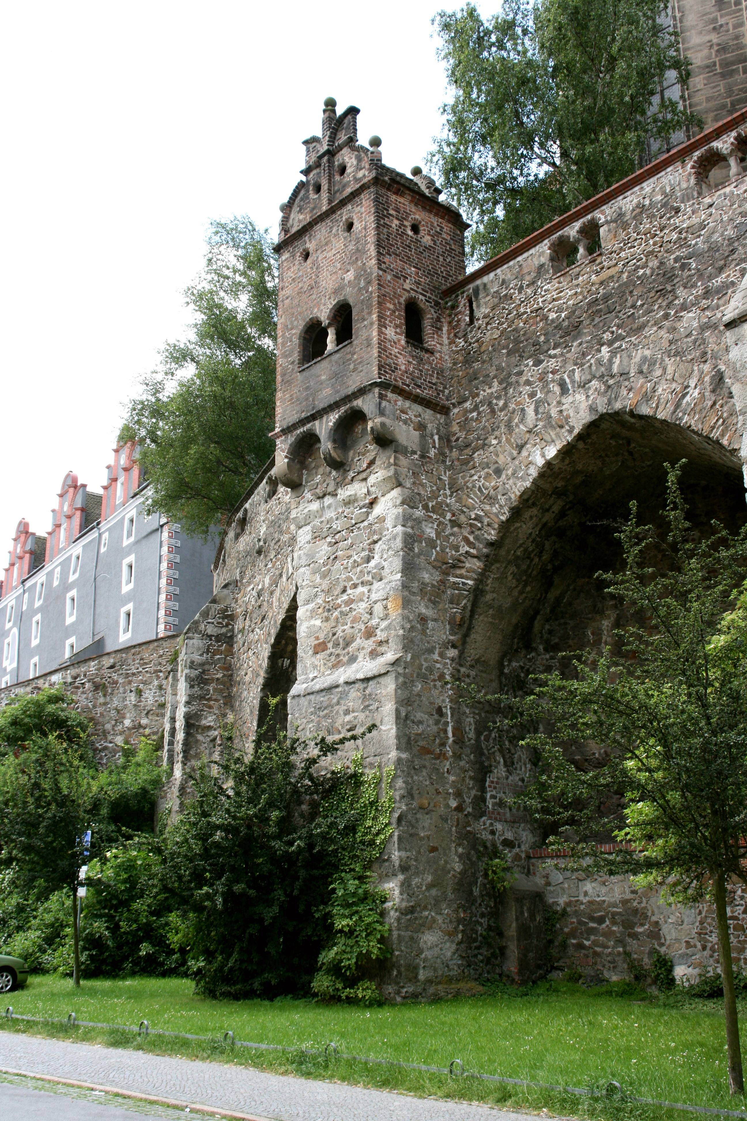 Hotherstraße in Görlitz